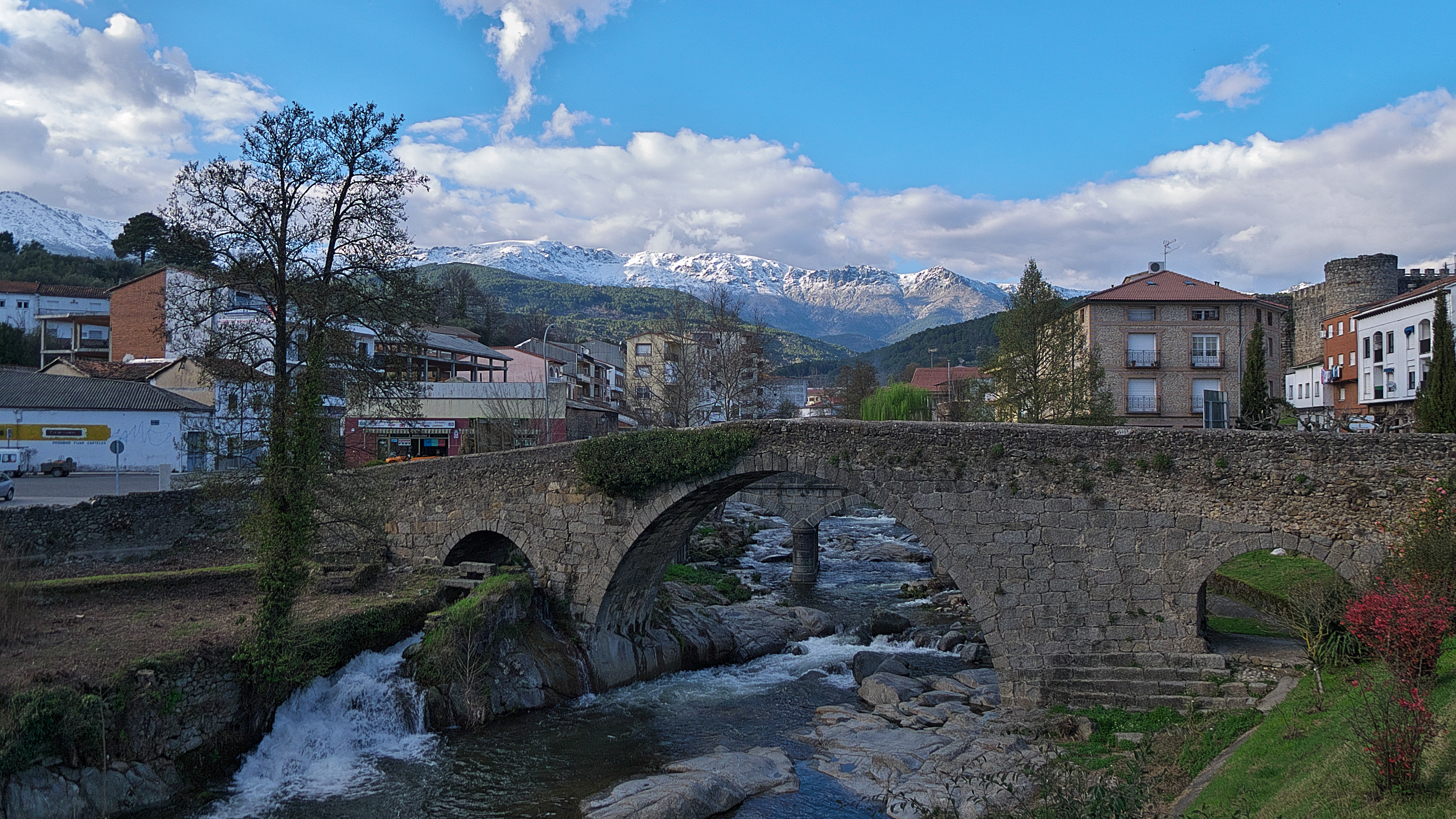 Puente Romano.Datado entre los siglos XIV y XV.